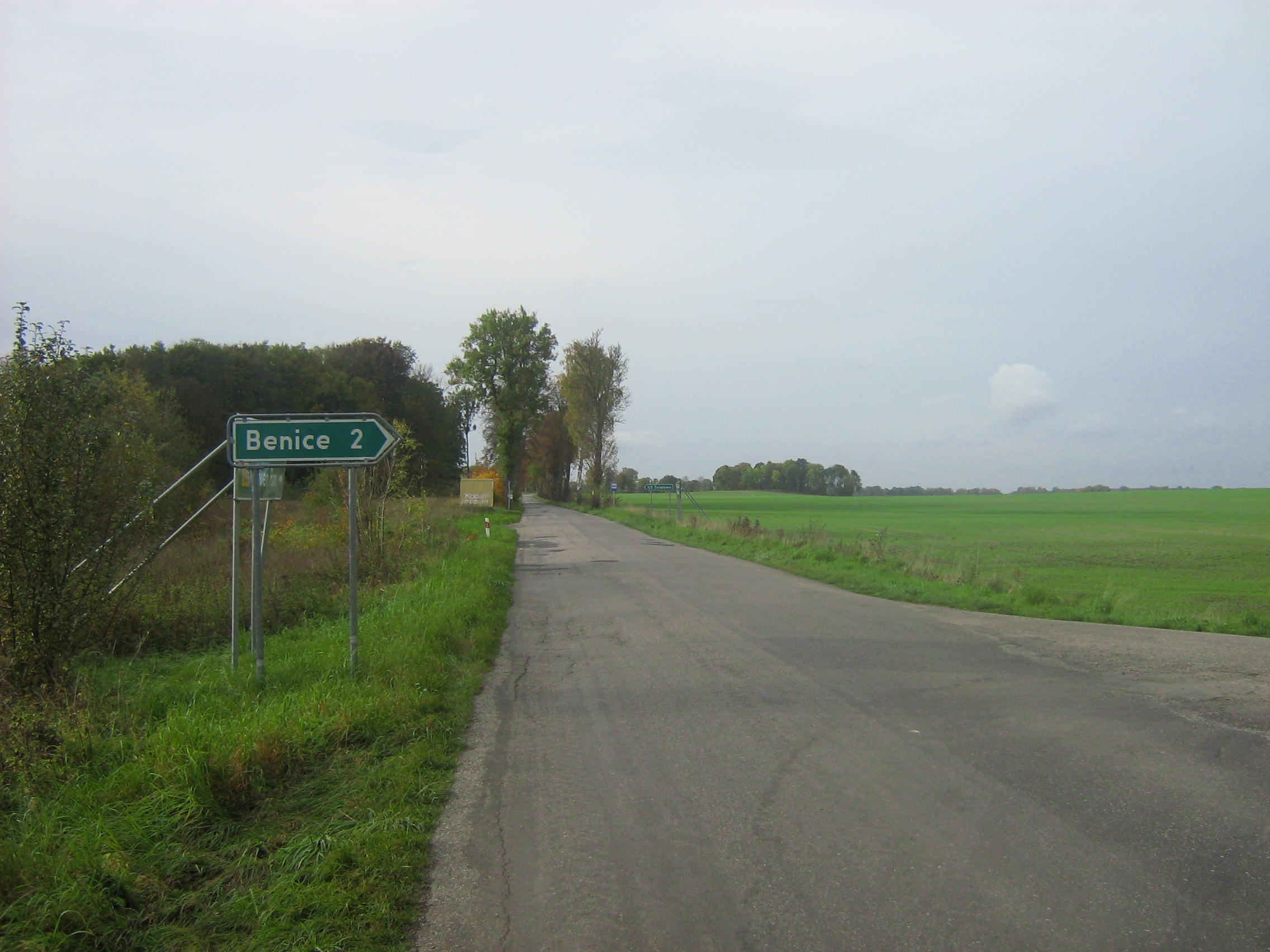 Droga krajowa nr 106 w okolic Benic.